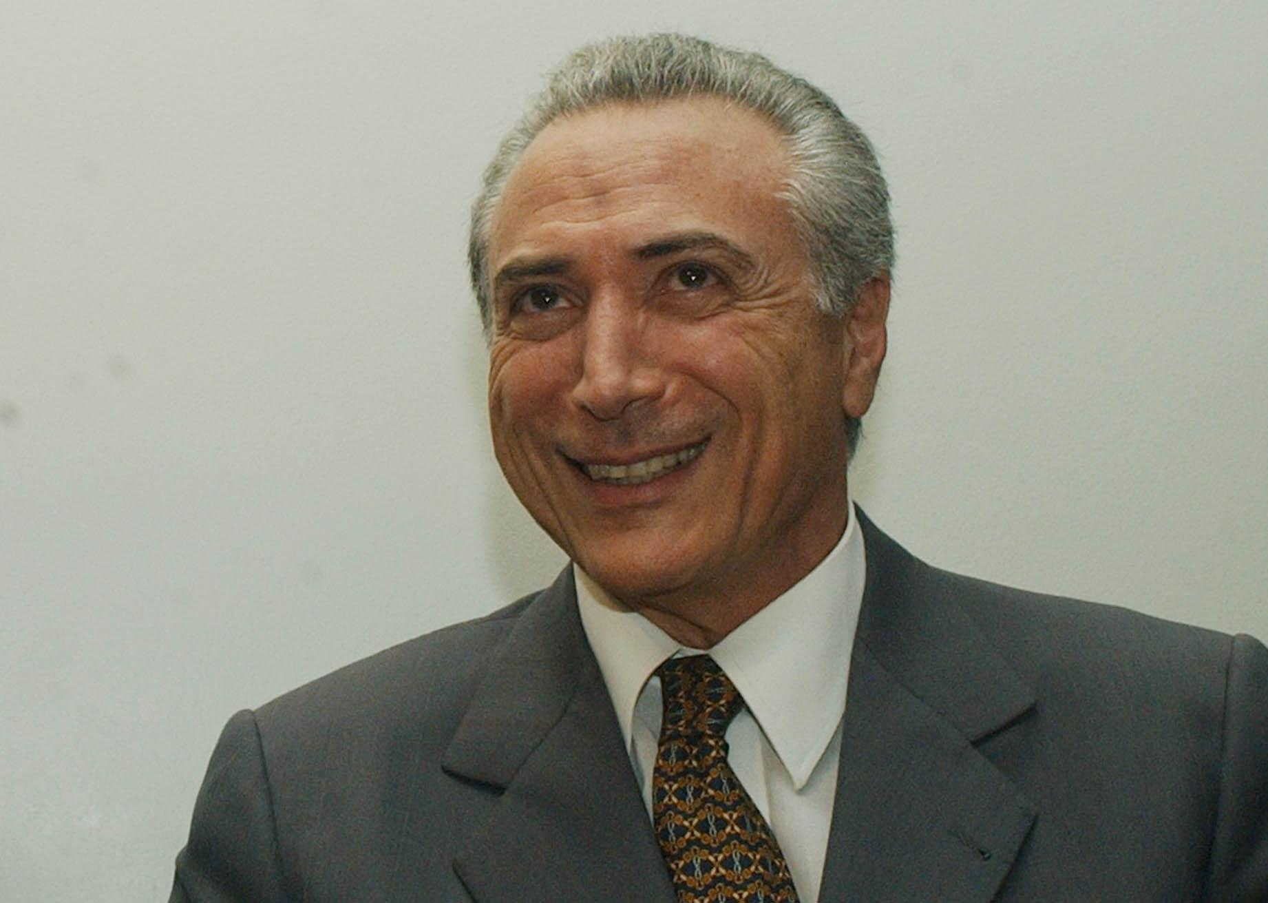 Brasília - Deputado Michel Temer, presidente do PMDB, dá entrevista na Câmara dos Deputados. Foto: Rose Brasil/ABr (imagem 75588)